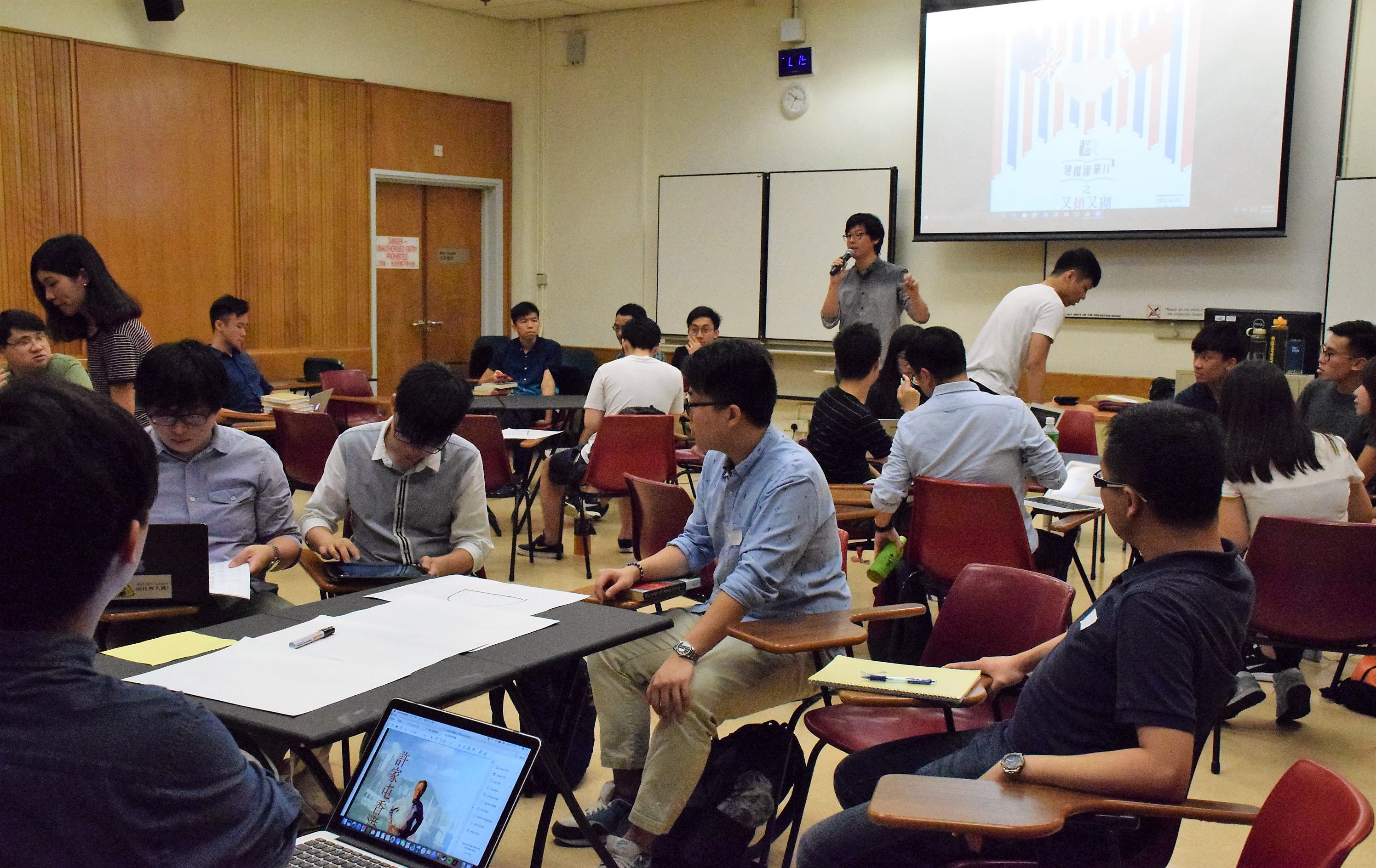 香港前途研究計劃第二次工作坊。(美國之音湯惠芸)